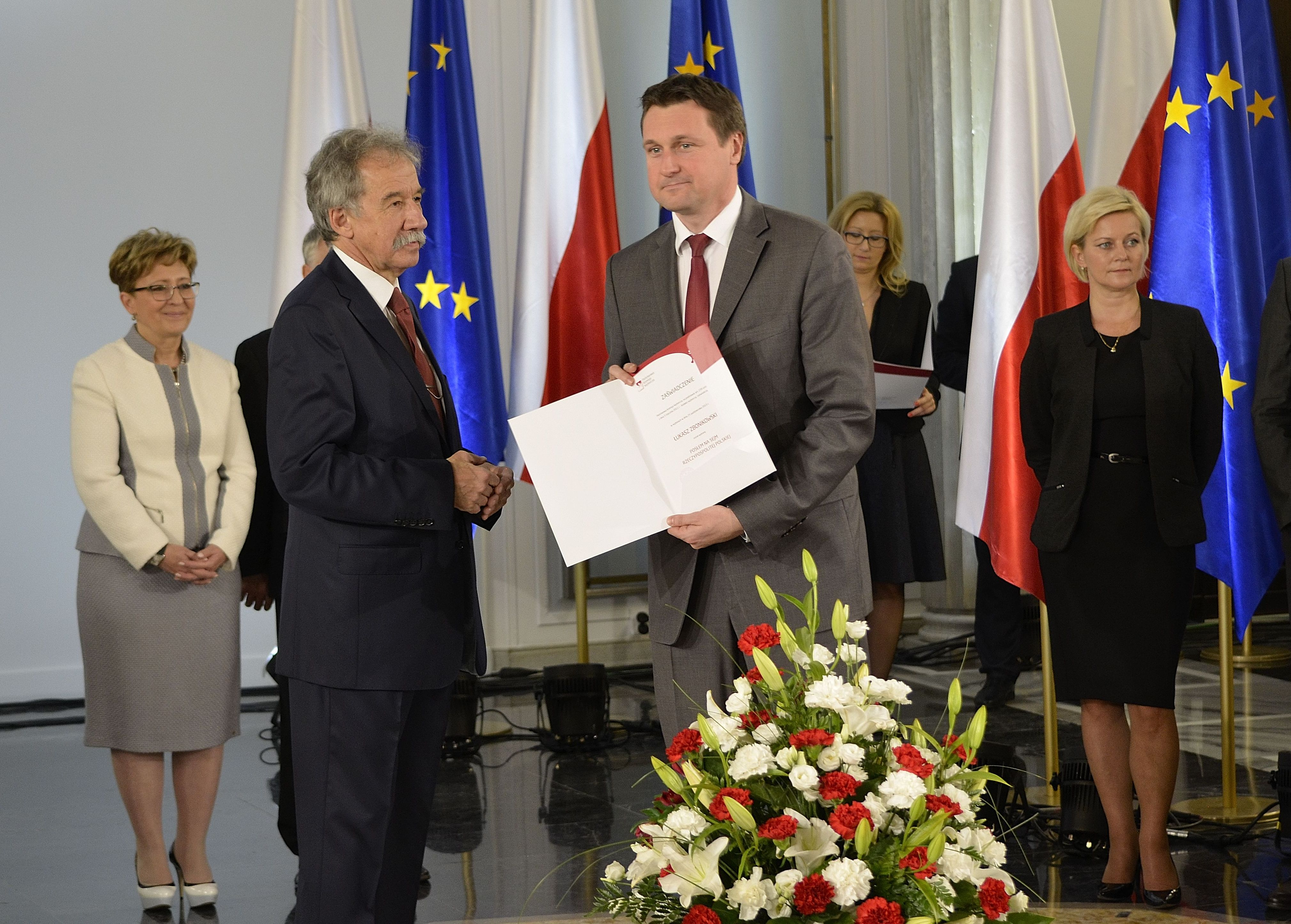 Poseł Łukasz Zbonikowski podczas uroczystości wręczenia zaświadczeń o wyborze nowo wybranym posłom w Sali Kolumnowej Sejmu